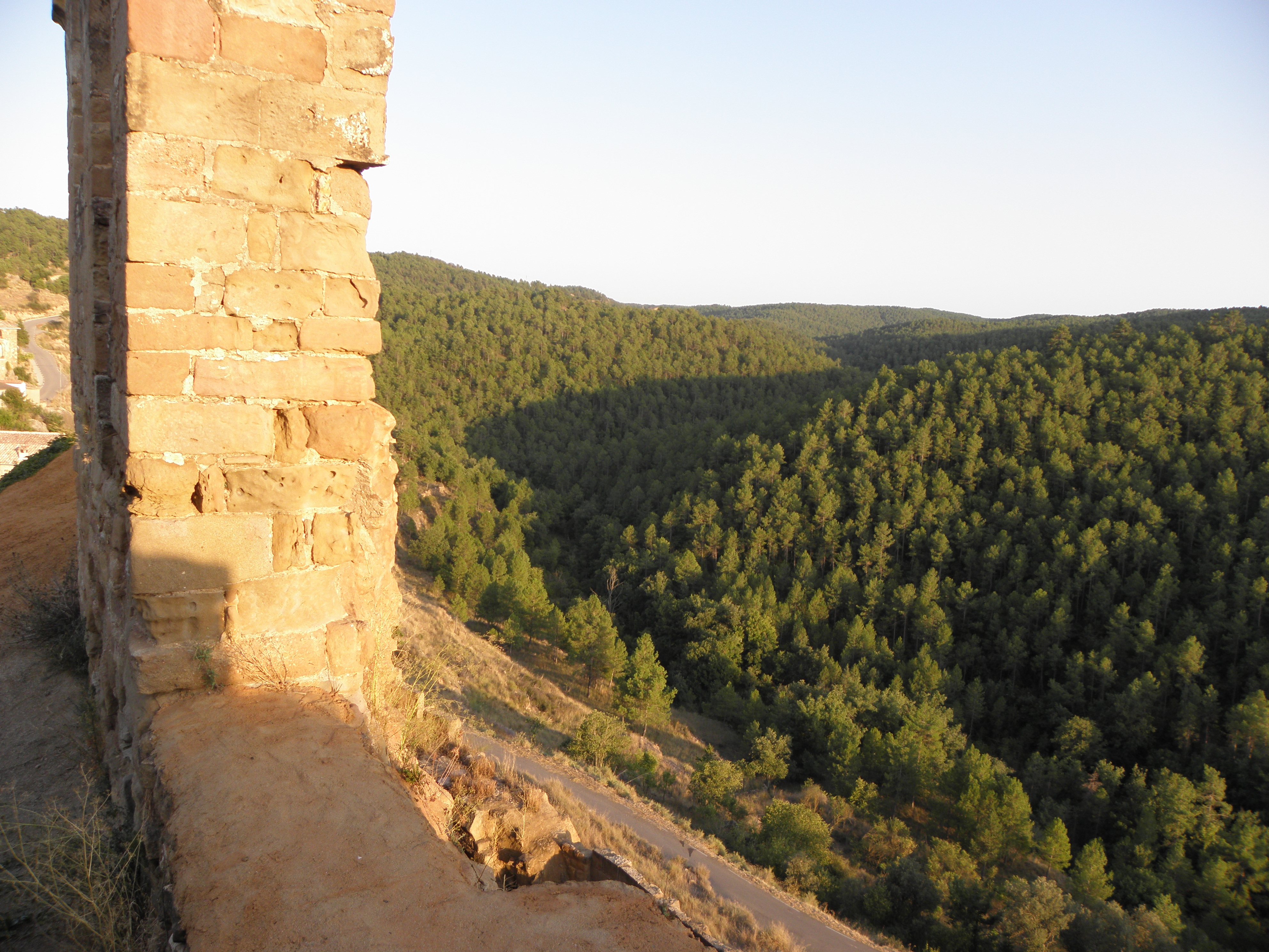 La vall del tram fial del Barranc de Sangrà vista des del Castell de Madrona.